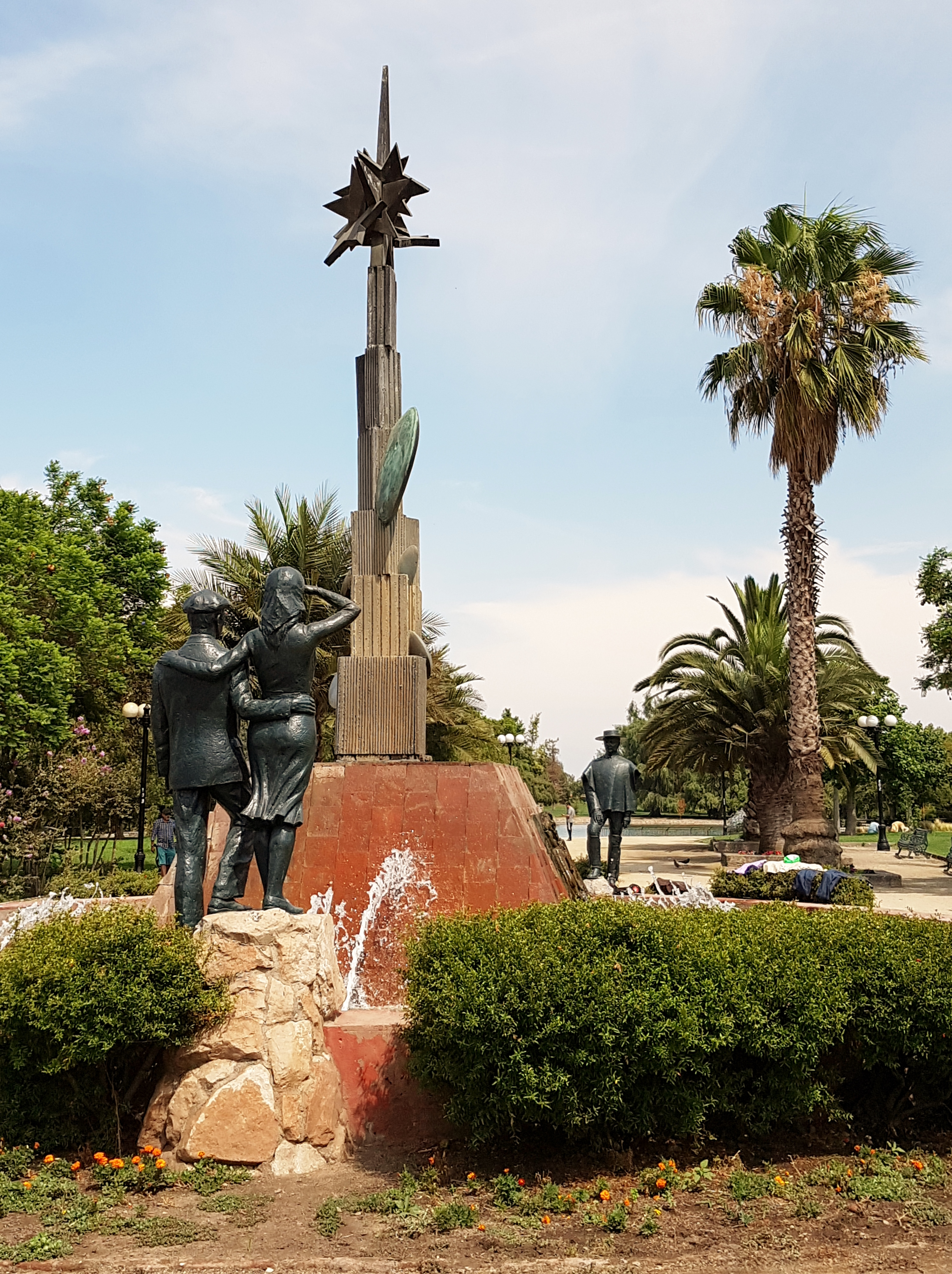 La fuente España, obra del escultor español Santiago de Santiago, parque de Los Reyes, Santiago de Chile.